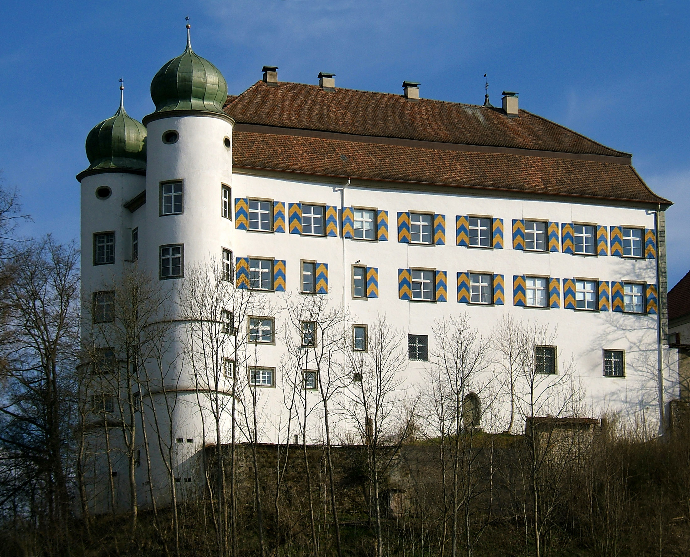 Blick auf Schloss Mühlheim in Mühlheim an der Donau. Das Schloss wird noch heute von der Familie von Enzberg bewohnt.